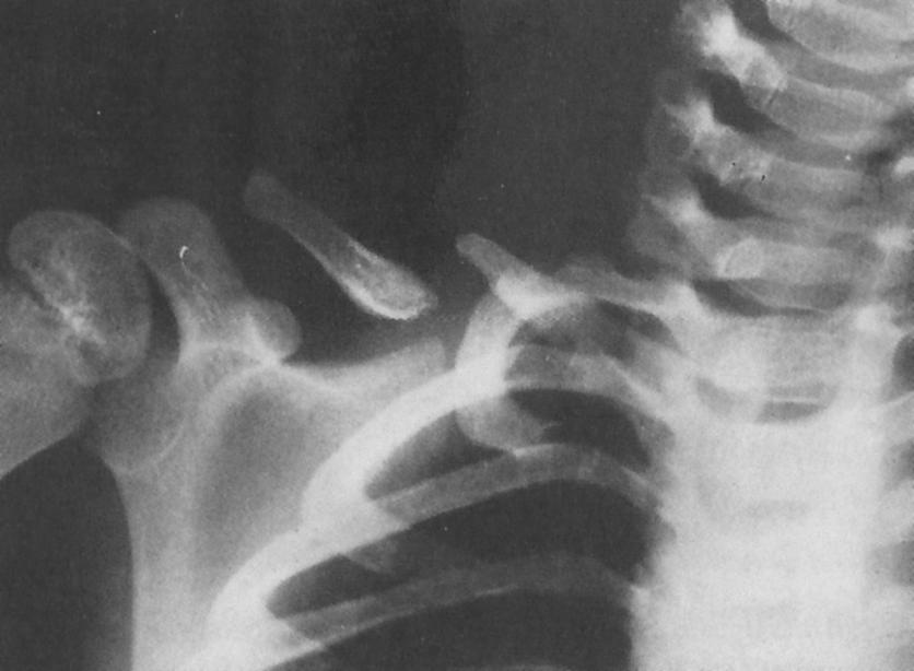 Angeborene Pseudarthrose der rechten Klavikula bei einem 3-jährigen Mädchen. Die Fehlbildung war schon im 2. Lebensmonat aufgefallen.